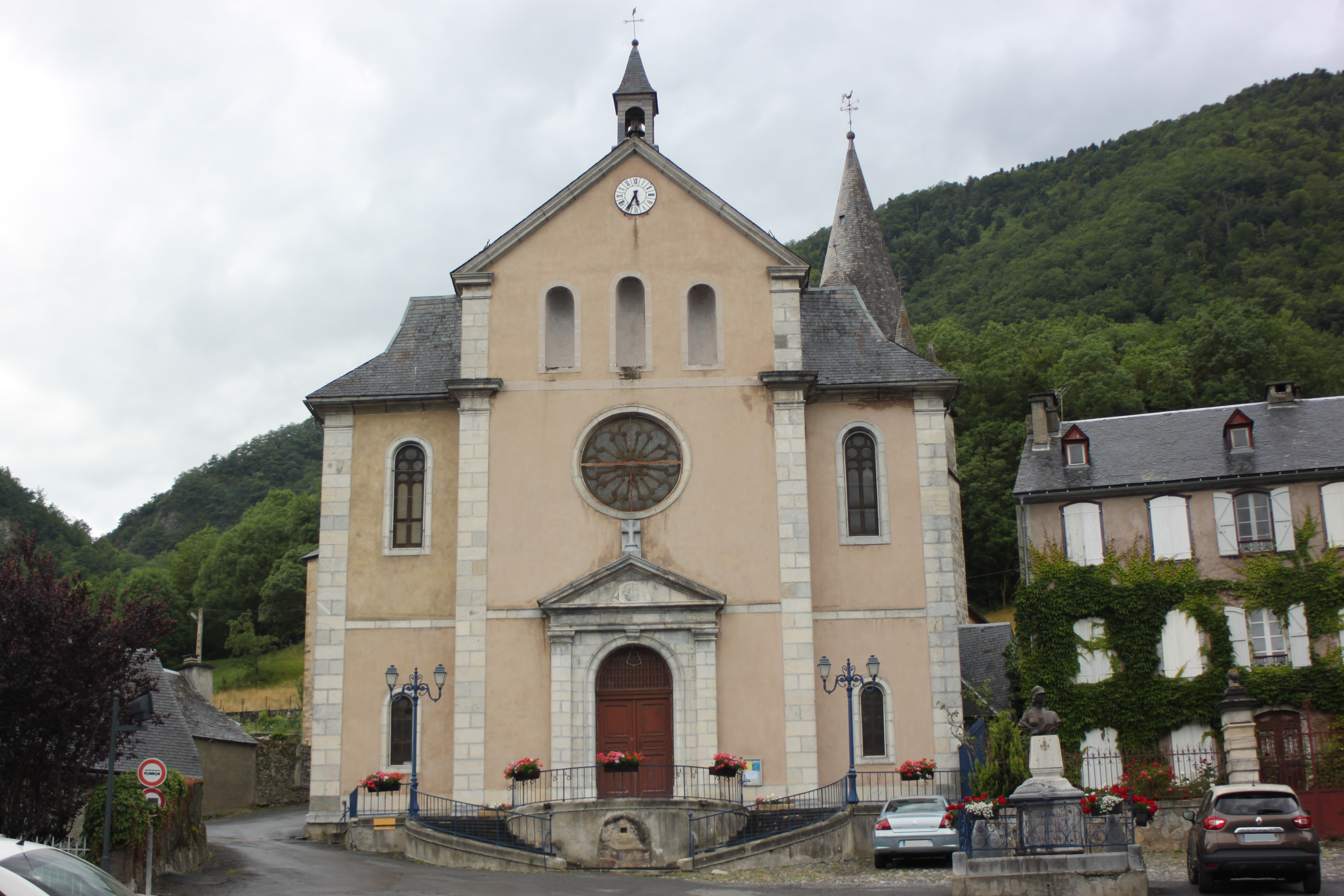 Église Saint-Blaise, Fr-65-Ancizan.